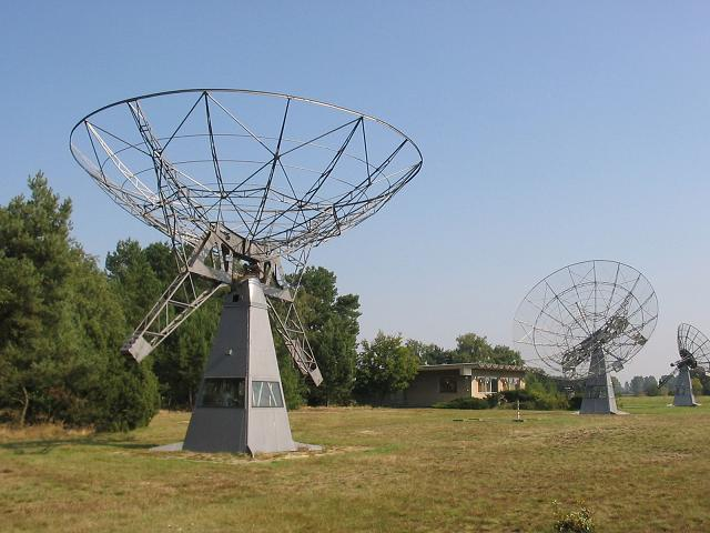 Leibniz-Institut für Astrophysik Potsdam, Außenstelle in Tremsdorf (OSRA) Fotografiert im Spetember 2005 von Lienhard Schulz 11:59, 3. Okt 2005 (CEST)